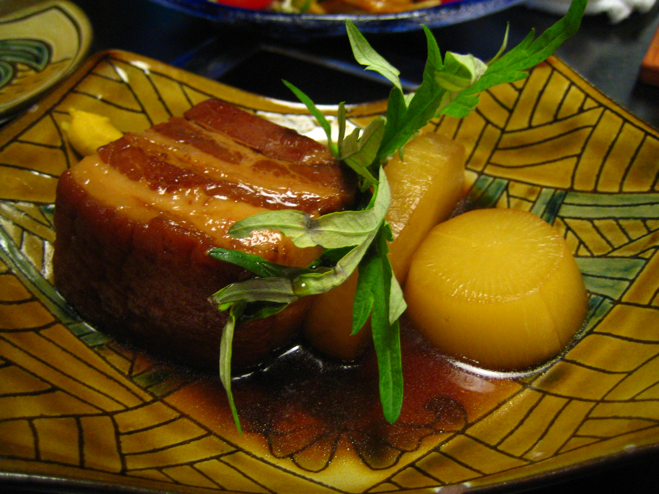 at Churasan-Ya, Monzen-nakachou, Tokyo